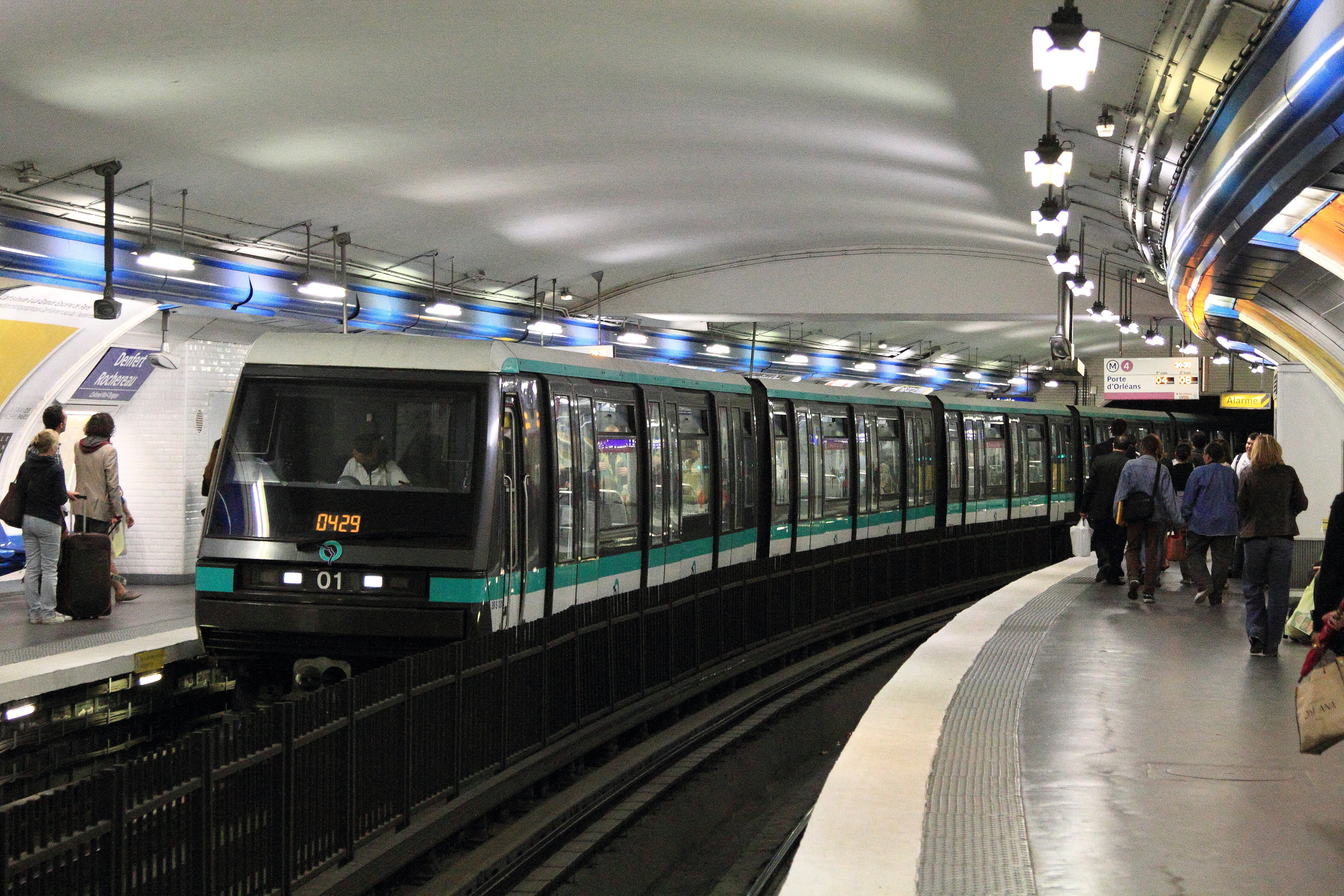 Le MP 89 n° 01 entre dans la station Denfert-Rochereau à Paris